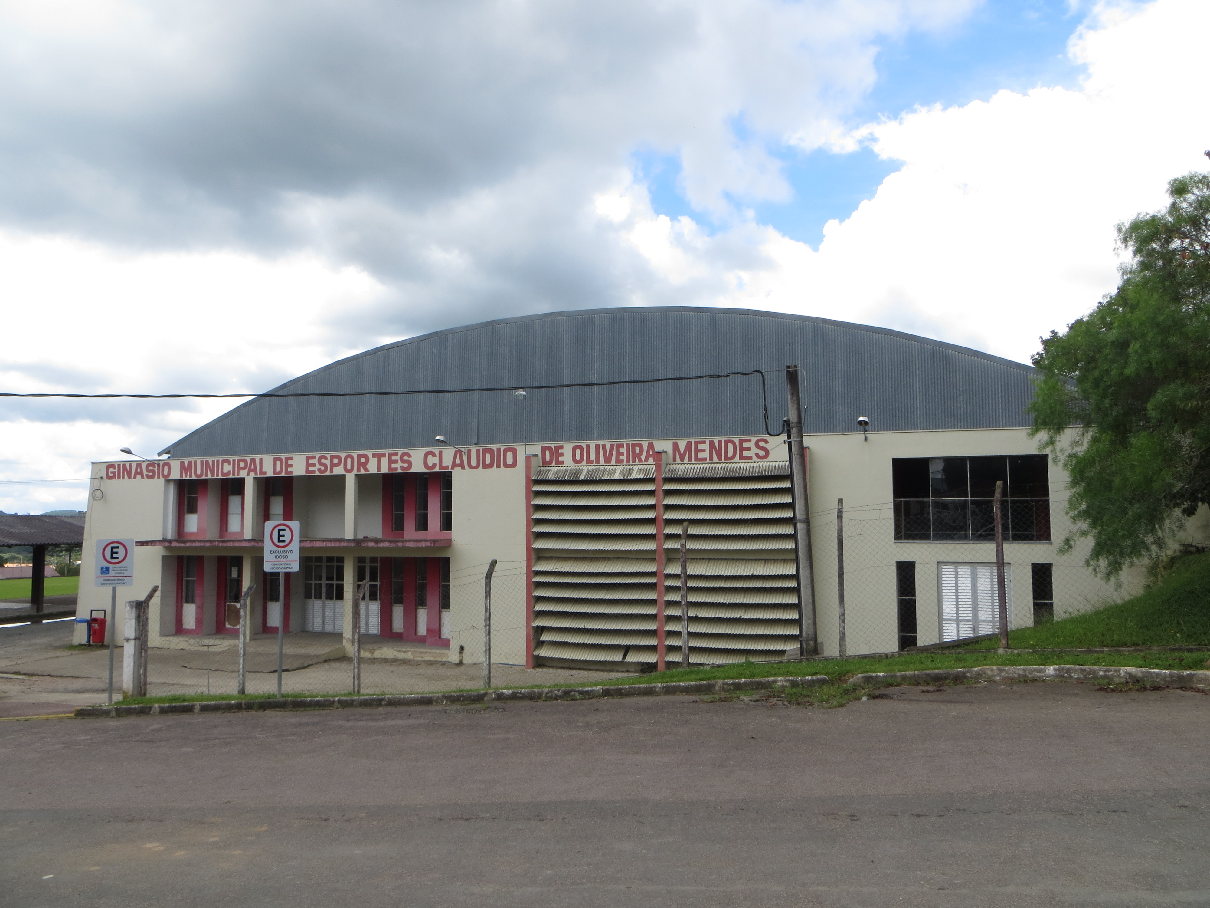 Ginásio Municipal de Esportes Cláudio de Oliveira Mendes em Piên, Estado do Paraná, Brasil.